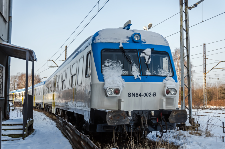 Spalinowy zespół trakcyjny SN84-002 odstawiony na terenie byłego Śląskiego Zakładu Przewozów Regionalnych przy ul. Raciborskiej w Katowicach. Tabor został przejęty przez Komornika Sądowego i oczekuje na licytację komorniczą.